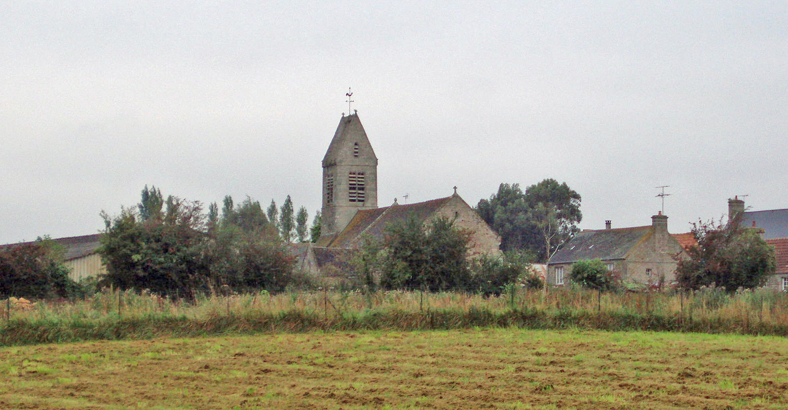 l'eglise de Canteloup, Manche vu de lointain